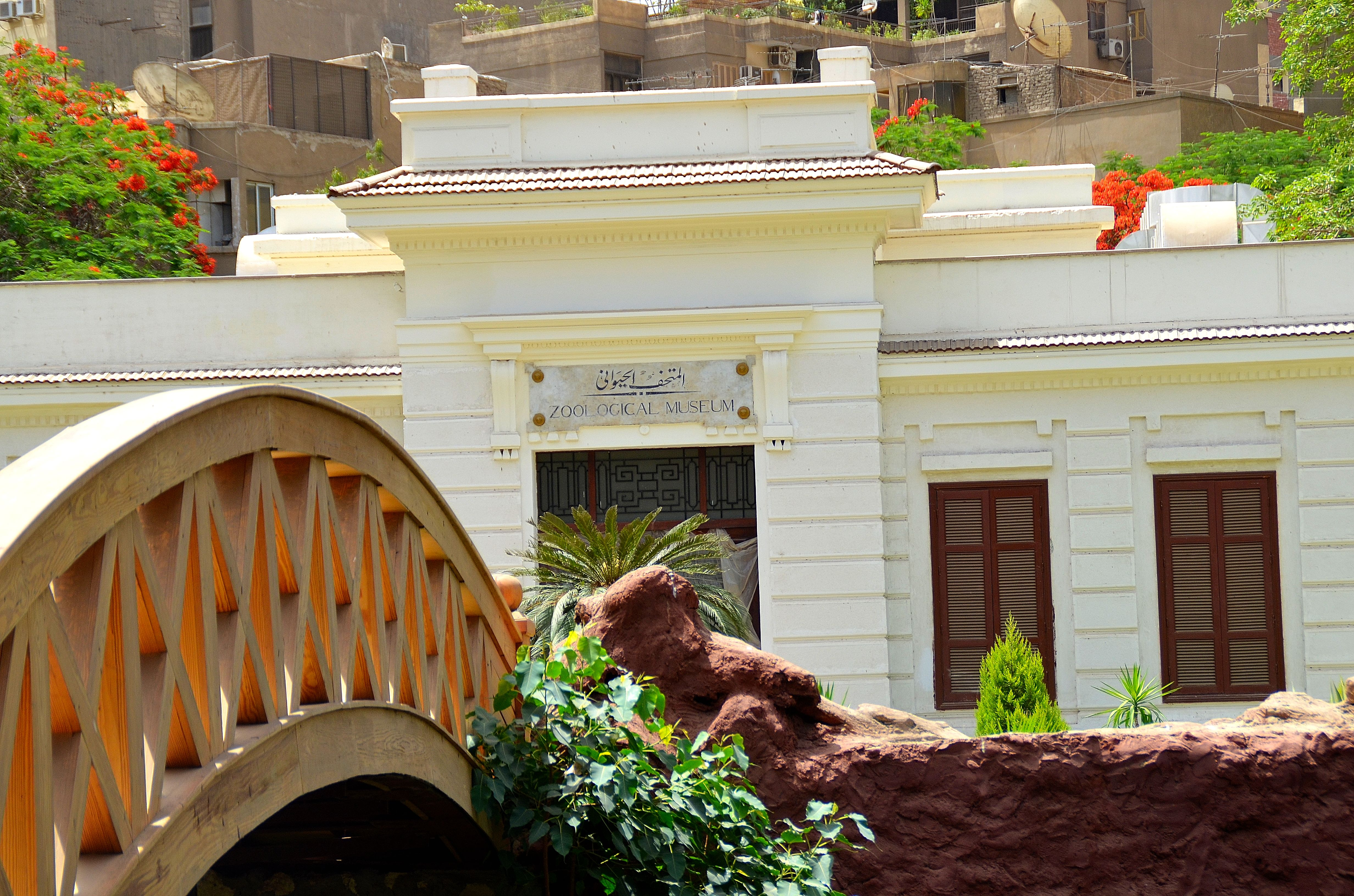 متحف الحيوان في حديقة حيوان الجيزة